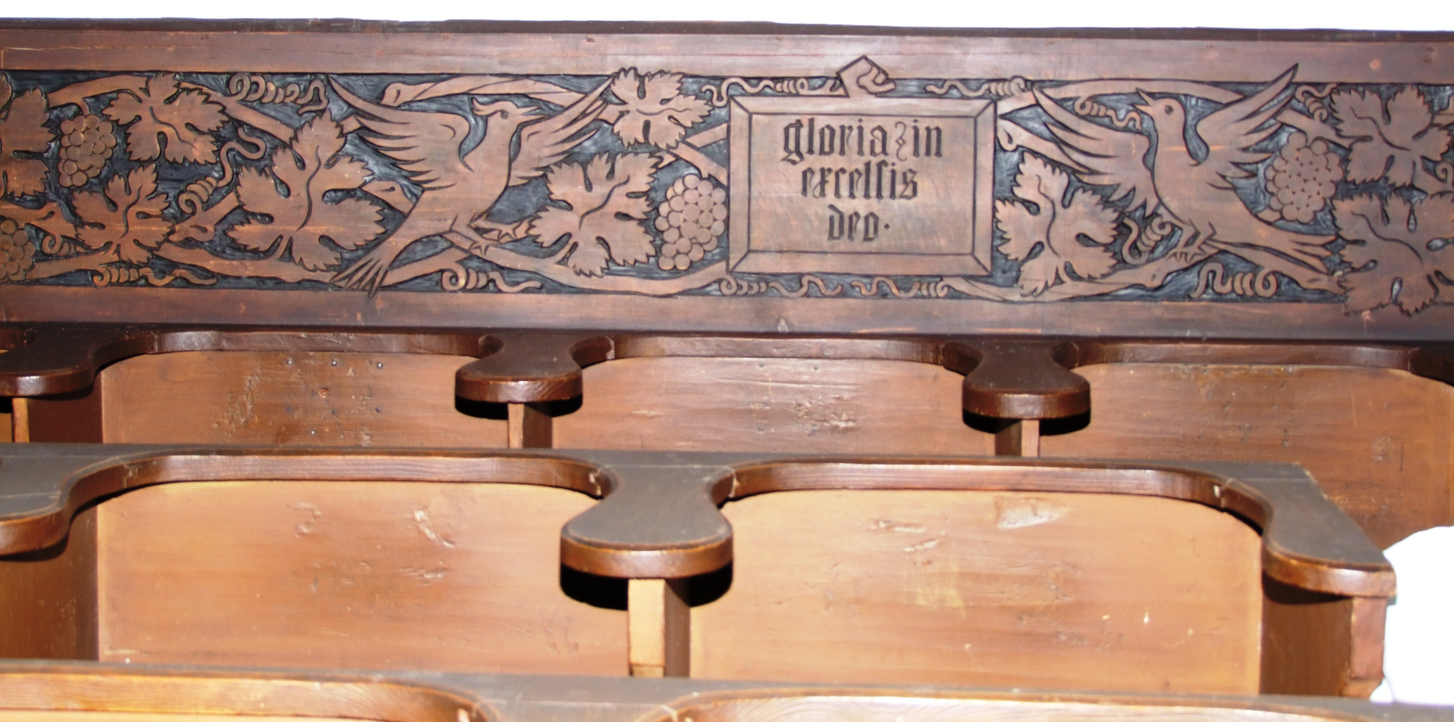 Kirche Unser Frauen zu Memmingen